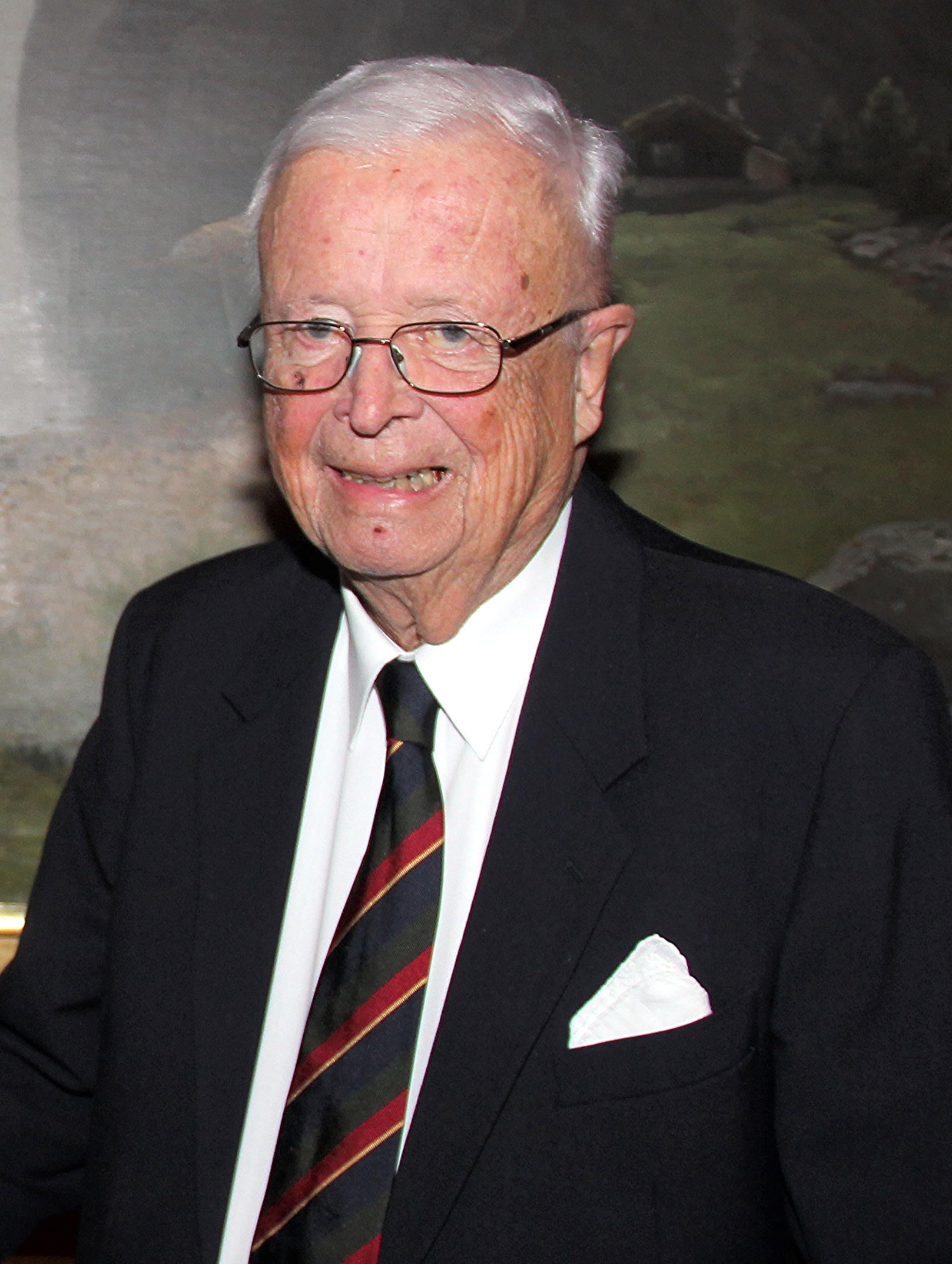 Fylkesutvalget i Aust-Agder har tildelt kulturprisen for 2013 til Birger Smith-Sørensen for hans innsats ved å på eget initiativ ta vare på og utvikle Bratteklev som privat musealt skipsverft og samling. - Det er en stor ære å tildele Birger Smith-Sørensen Aust-Agder fylkeskommunes kulturpris for 2013, sa fylkesordfører Bjørgulv Sverdrup Lund under tildelingen. Smith-Sørensen mottok prisen av fylkesordføreren under en middag for fylkestinget i Arendal gamle rådhus tirsdag 10 desember. Foto: AAFK